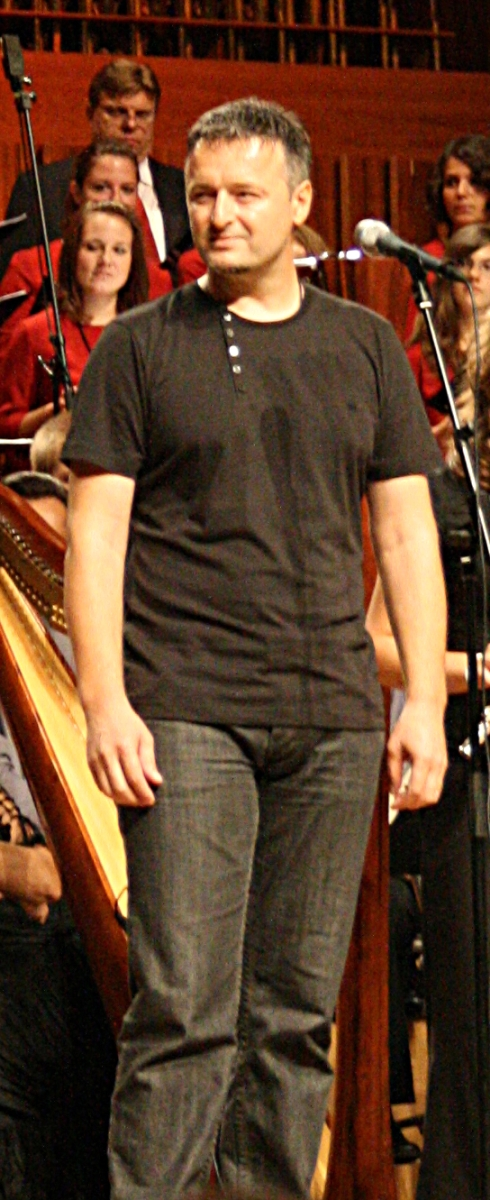 Marko Perković Thompson na dobrotvornom koncertu "Križ nek' ti sačuva ime" u koncernoj dvorani Vatroslav Lisinski u Zagrebu